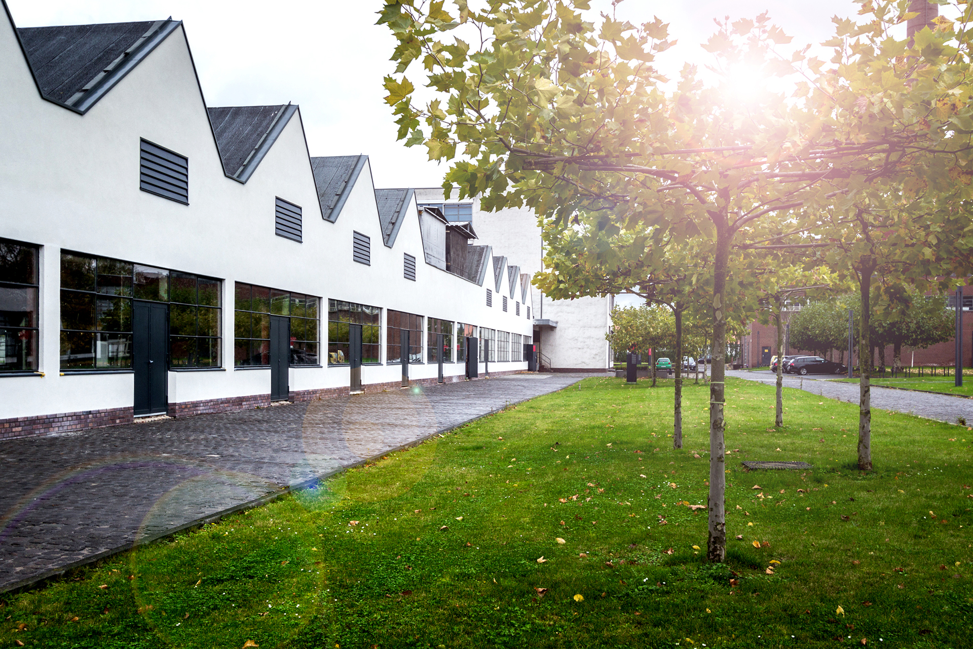 Ehemalige Färberei der VerseidAG, heute der Mies van der Rohe Business Park